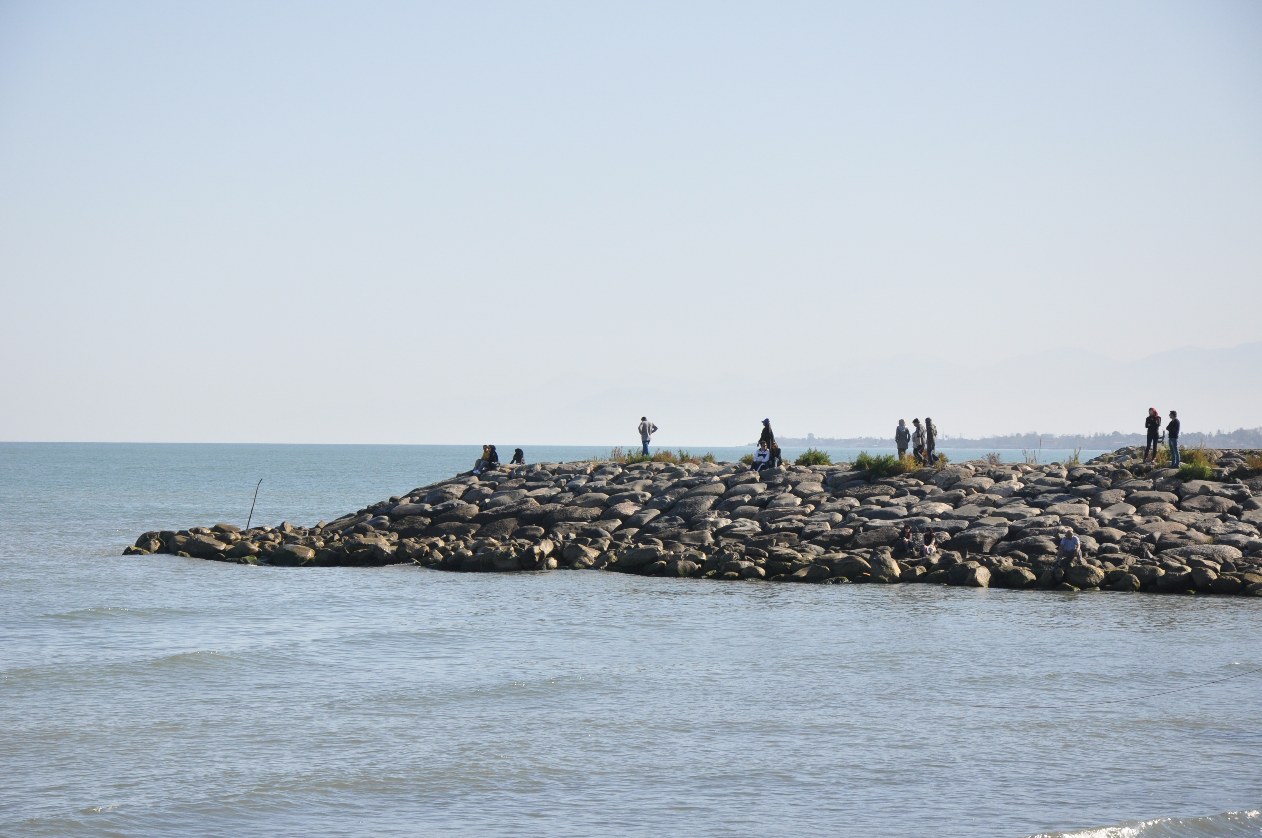 Ramsar Coast, Caspian sea, Mazandaran, Iran